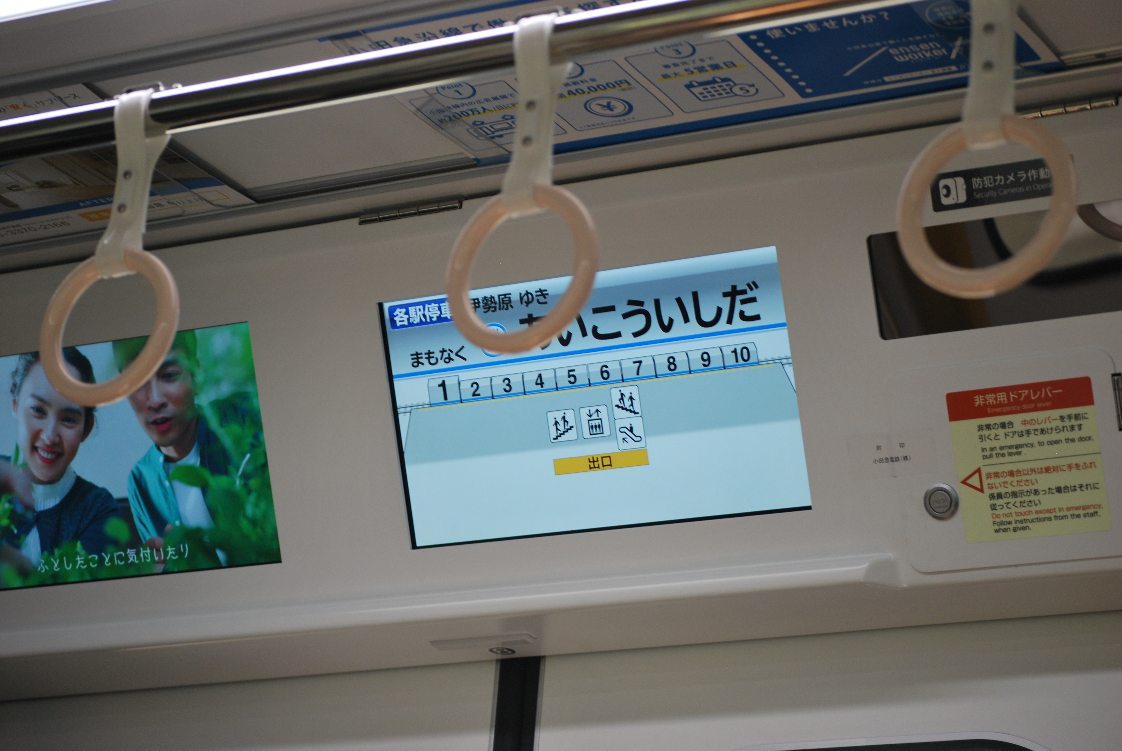 ⵜⴰⵎⴰⵣⵉⵖⵜ ⵜⴰⵏⴰⵡⴰⵢⵜ: LCD(液晶ディスプレイ)と防犯カメラ